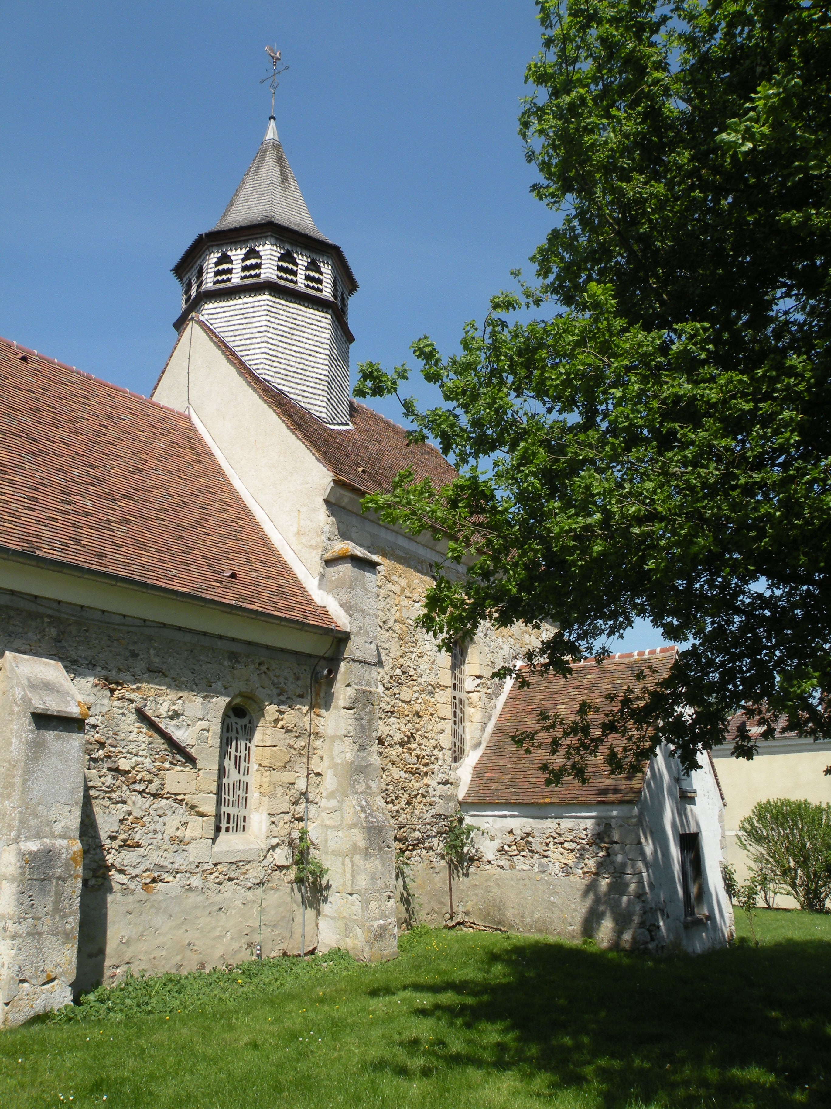 église Le Heaulme